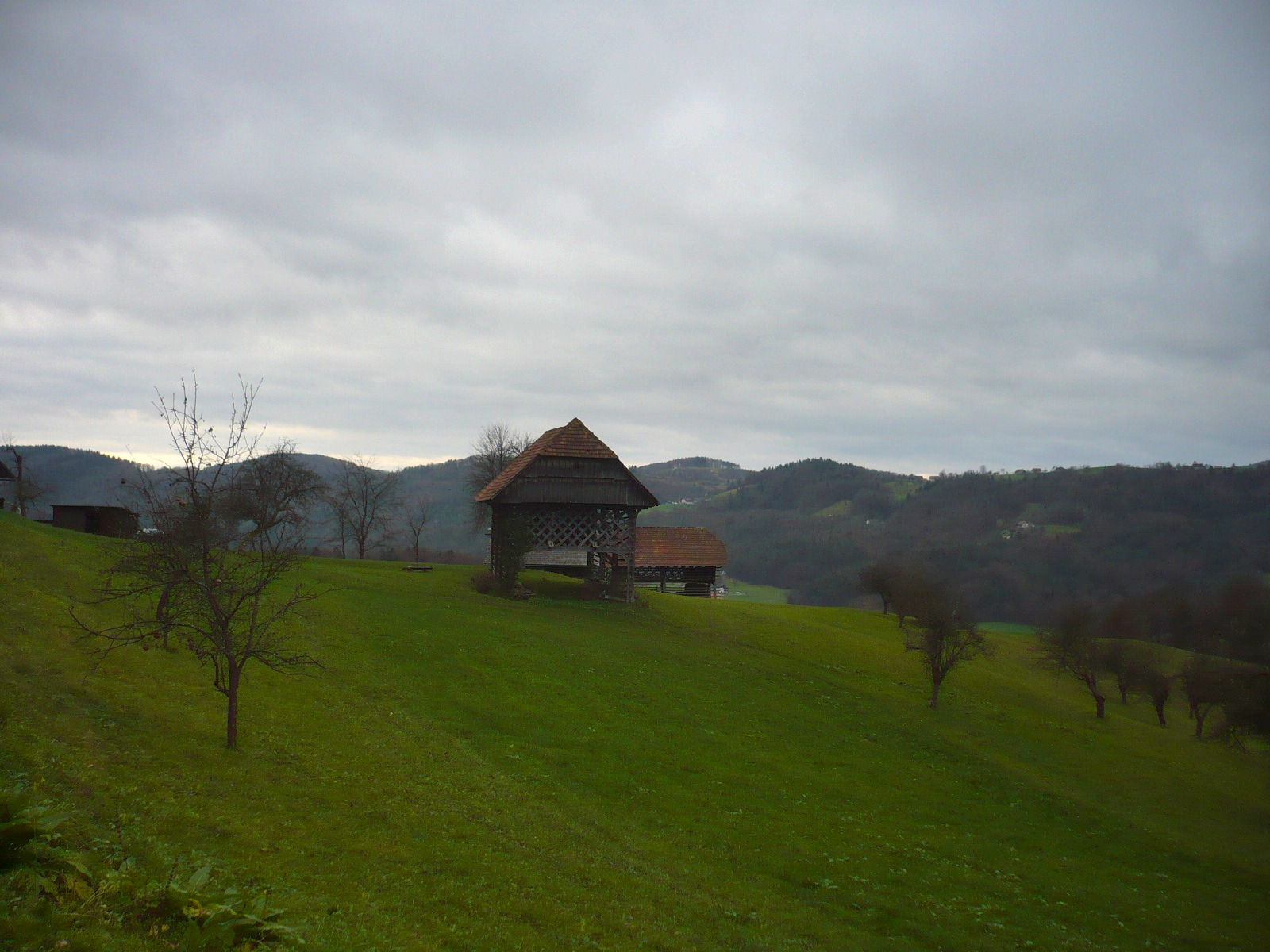 Levstikova pot